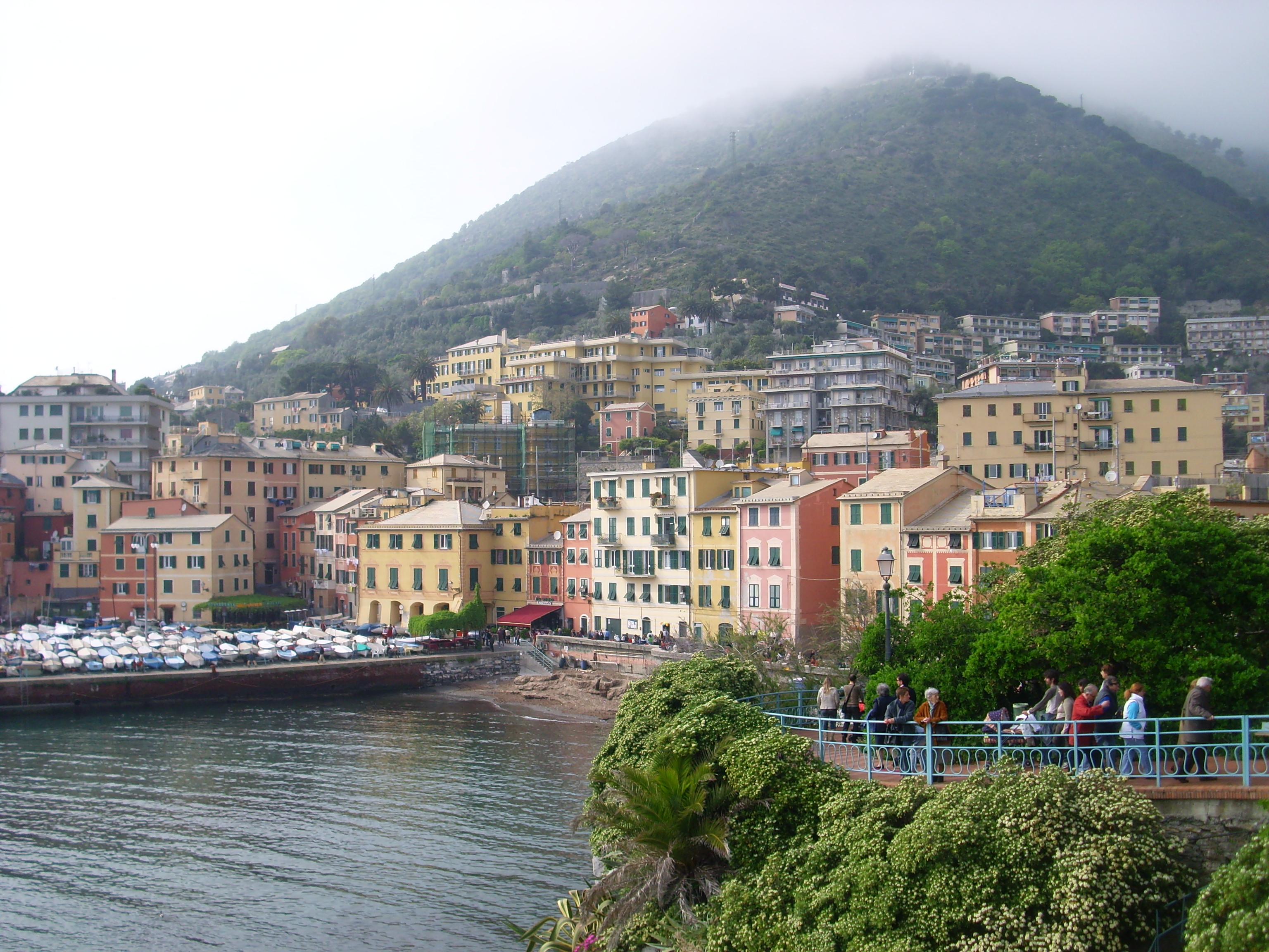 Passeggiata Anita Garibaldi, a Genova Nervi